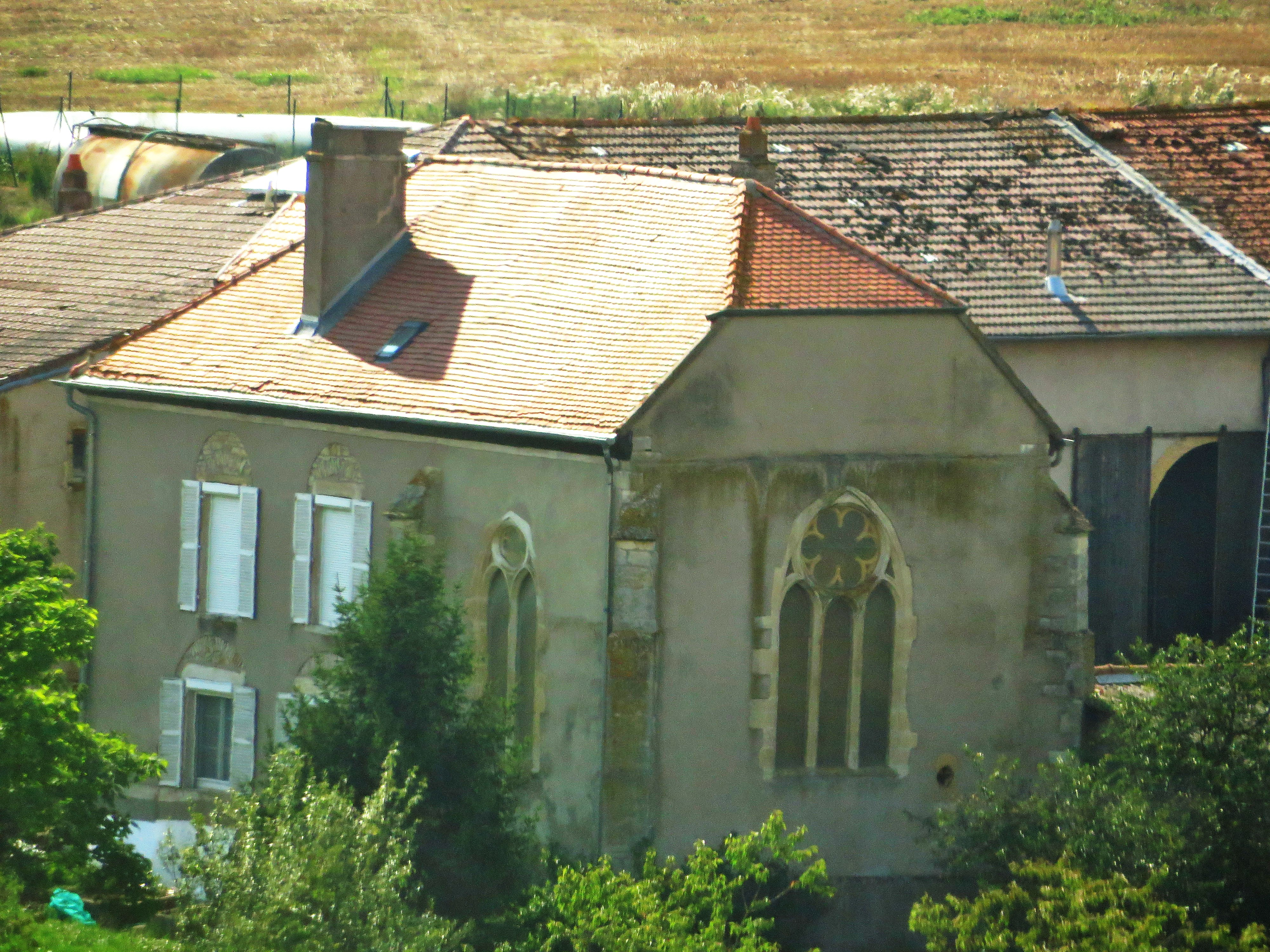 Secourt Berupt chapelle